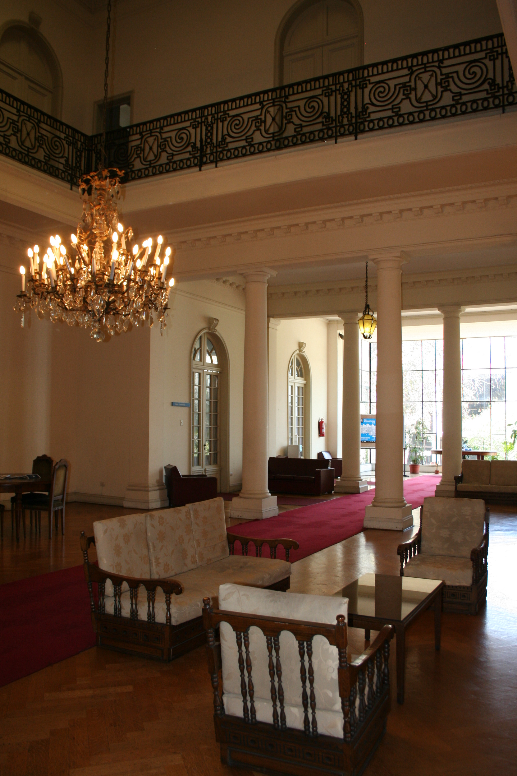 Salón principal del Palacio Astoreca. This is a photo of a national monument in Chile: 92